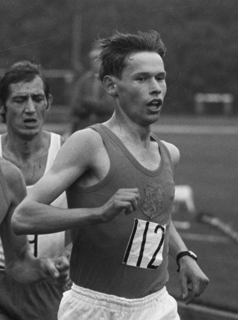 Atletiek Nederland tegen Denemarken in Groningen. Gerard Tebroke.